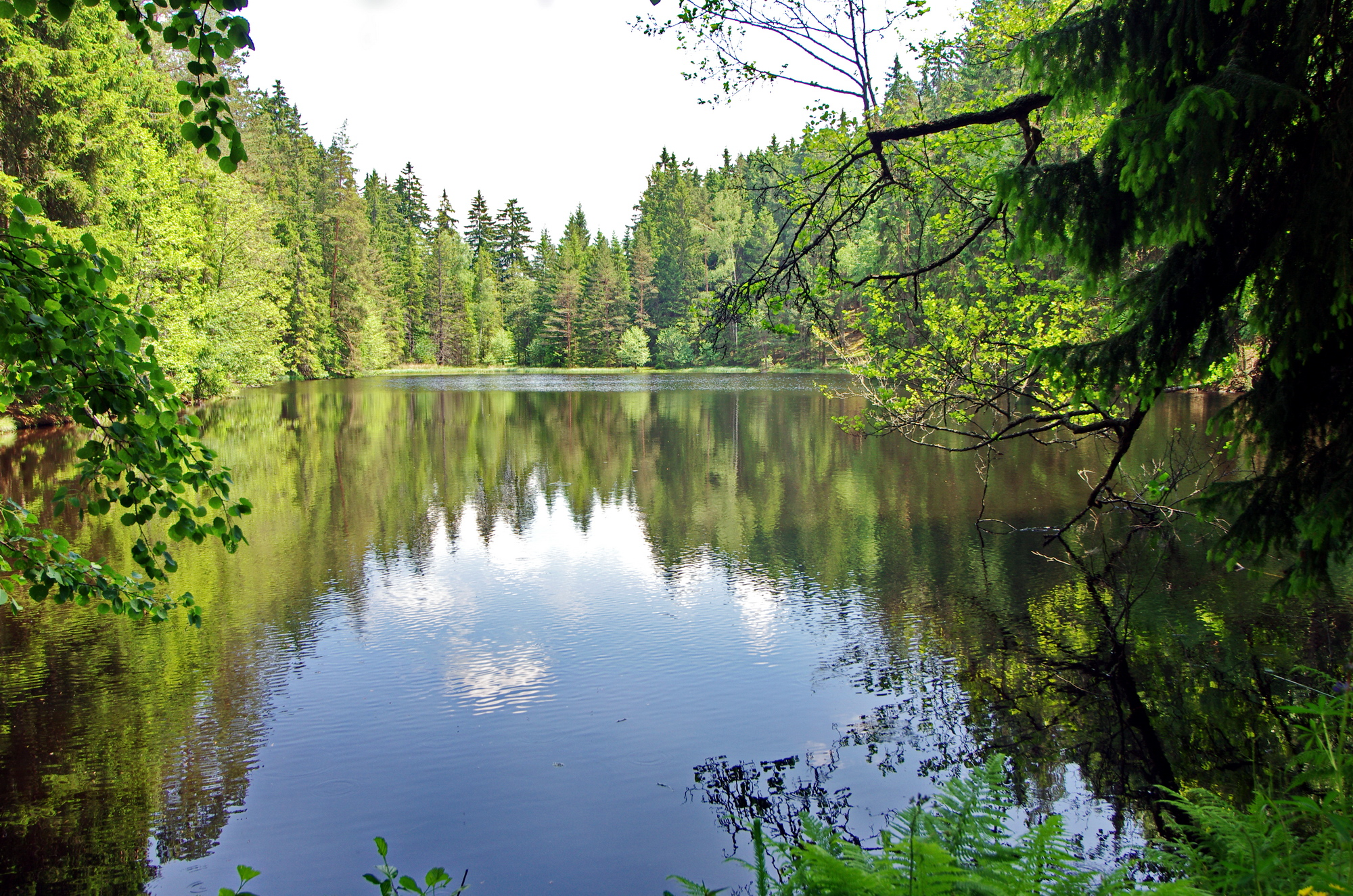 Evropsky významná lokalita - Bečovské lesní rybníky - Slavkovský les, okres Karlovy Vary